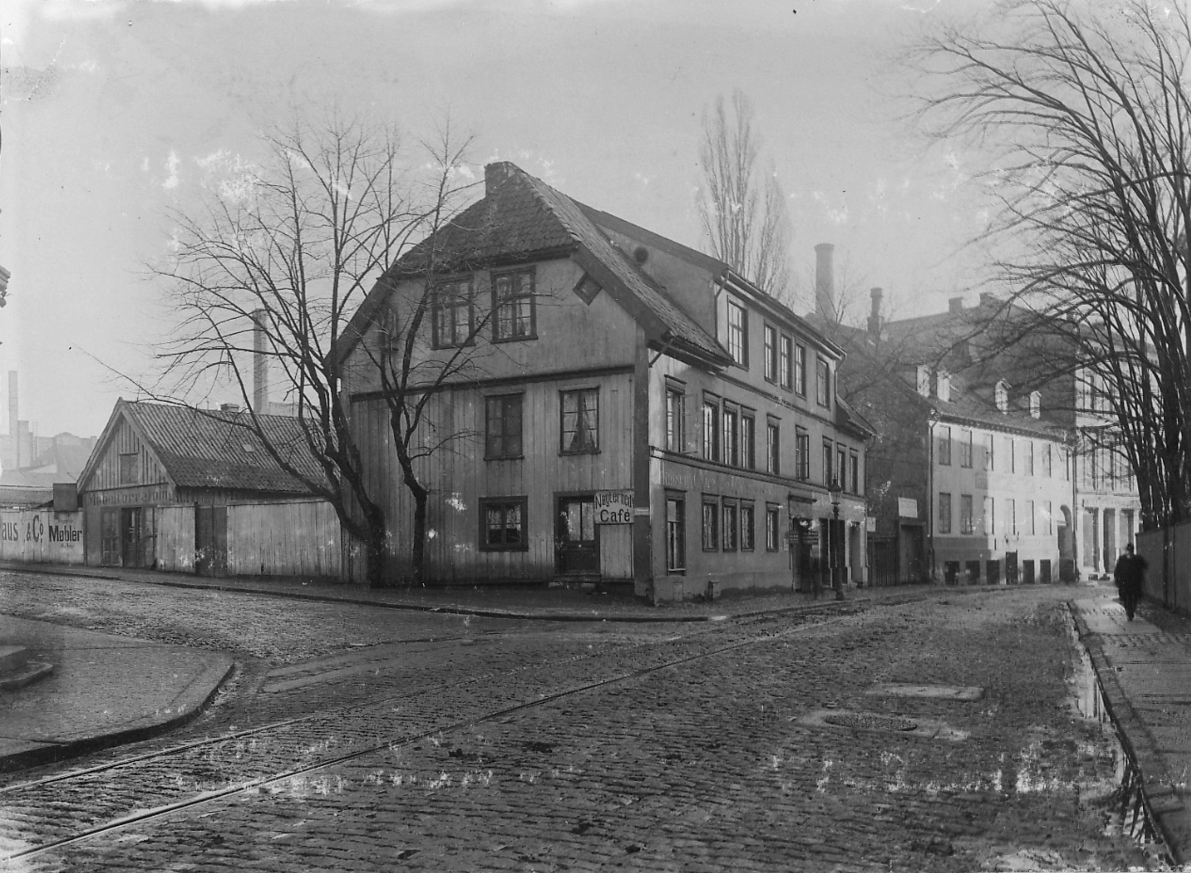 Peckelgården i Pilestredet 18, fotografert den 19.4.1896. Gården var fredet da den brant i 1974 og ble revet i 1975.